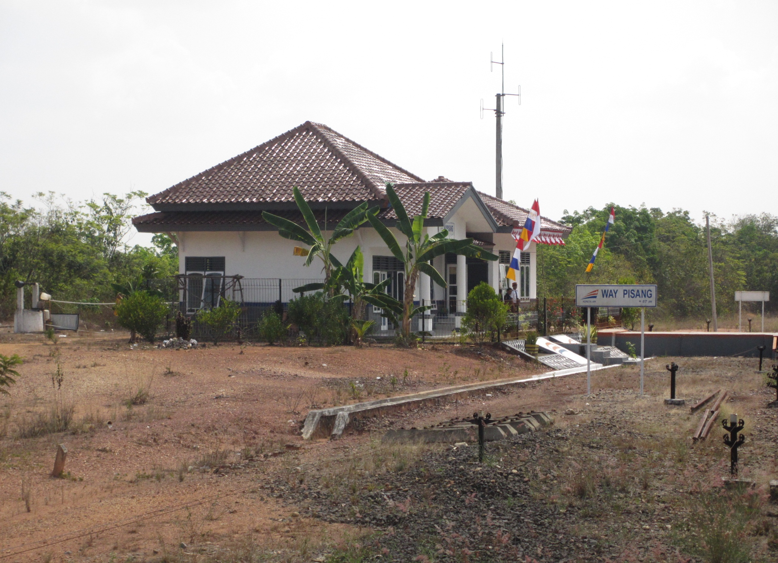 Stasiun Waypisang.